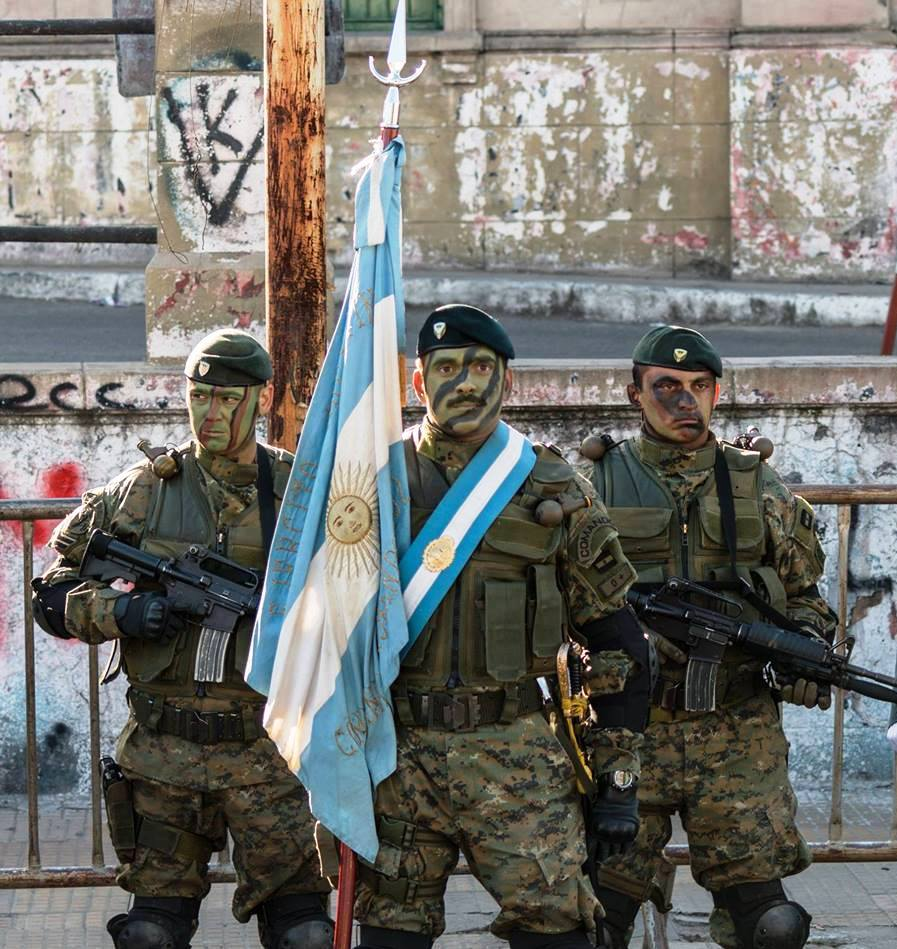 Comandos Argentinos con la bandera de guerra en un desfile cívico-militar en la Ciudad Autónoma de Buenos Aires